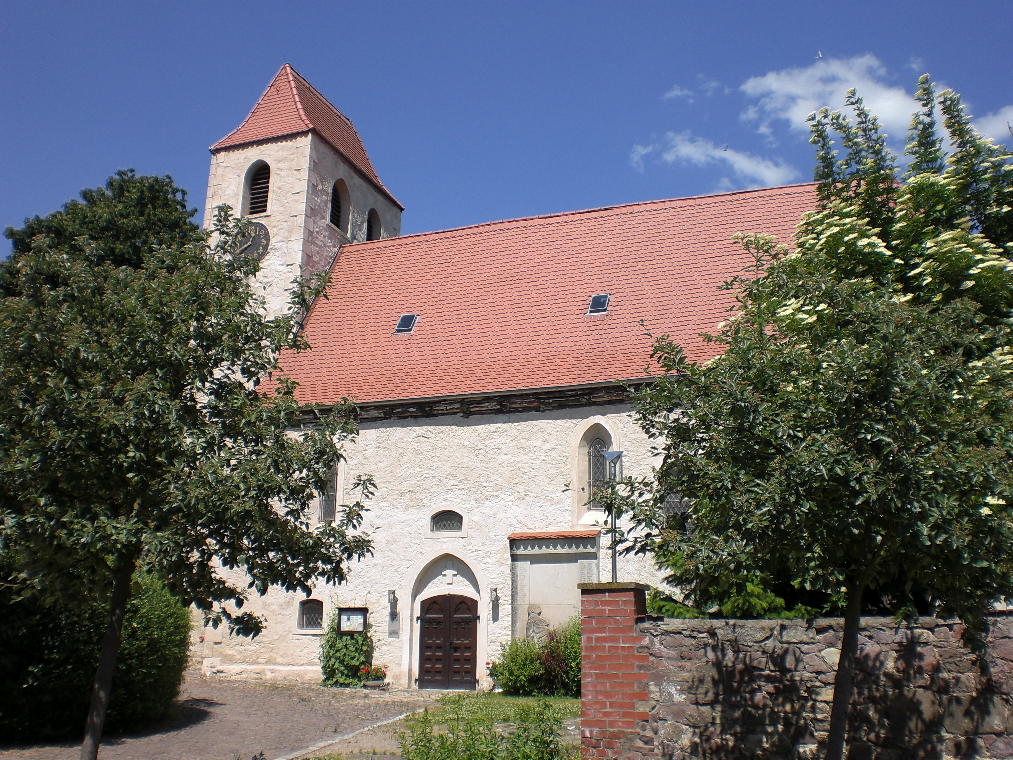 St. Johannes der Täufer Kirche in Magdeburg-Ottersleben